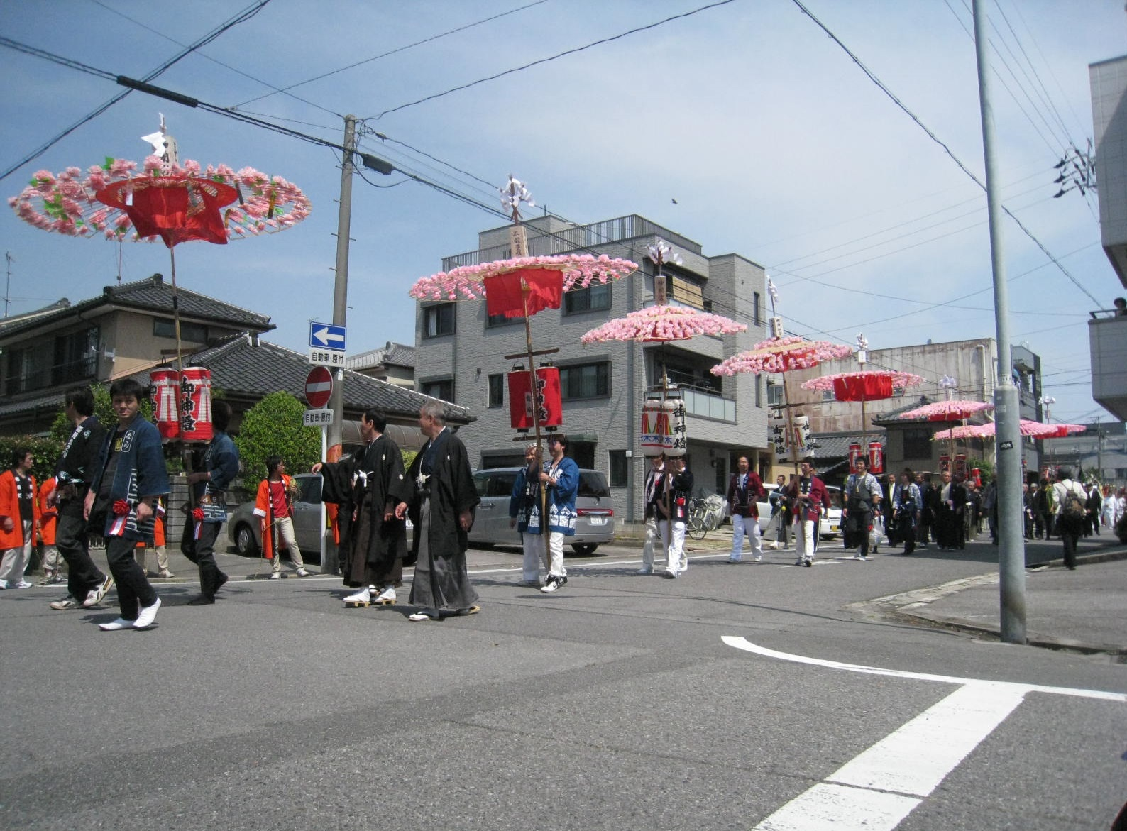 能見神明宮大祭（御神輿渡御）